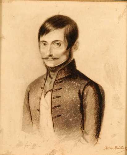 Kiss Bálint: Önarckép